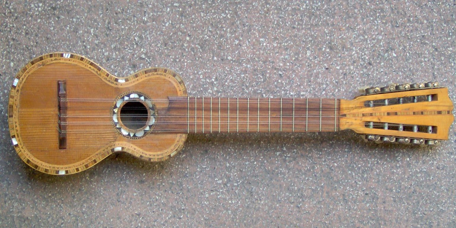 Bolivian charango (lacks scale to indicate dimensions) overall length = 63 cm